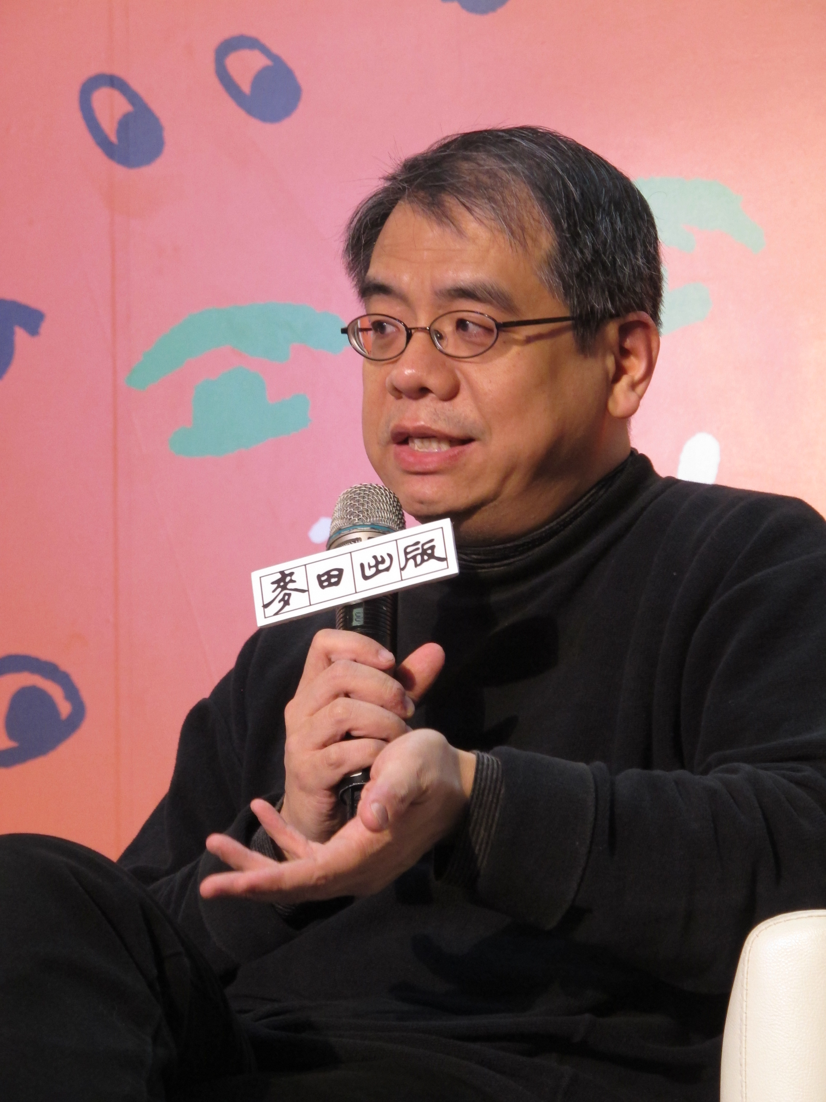 楊照，2013年台北國際書展。